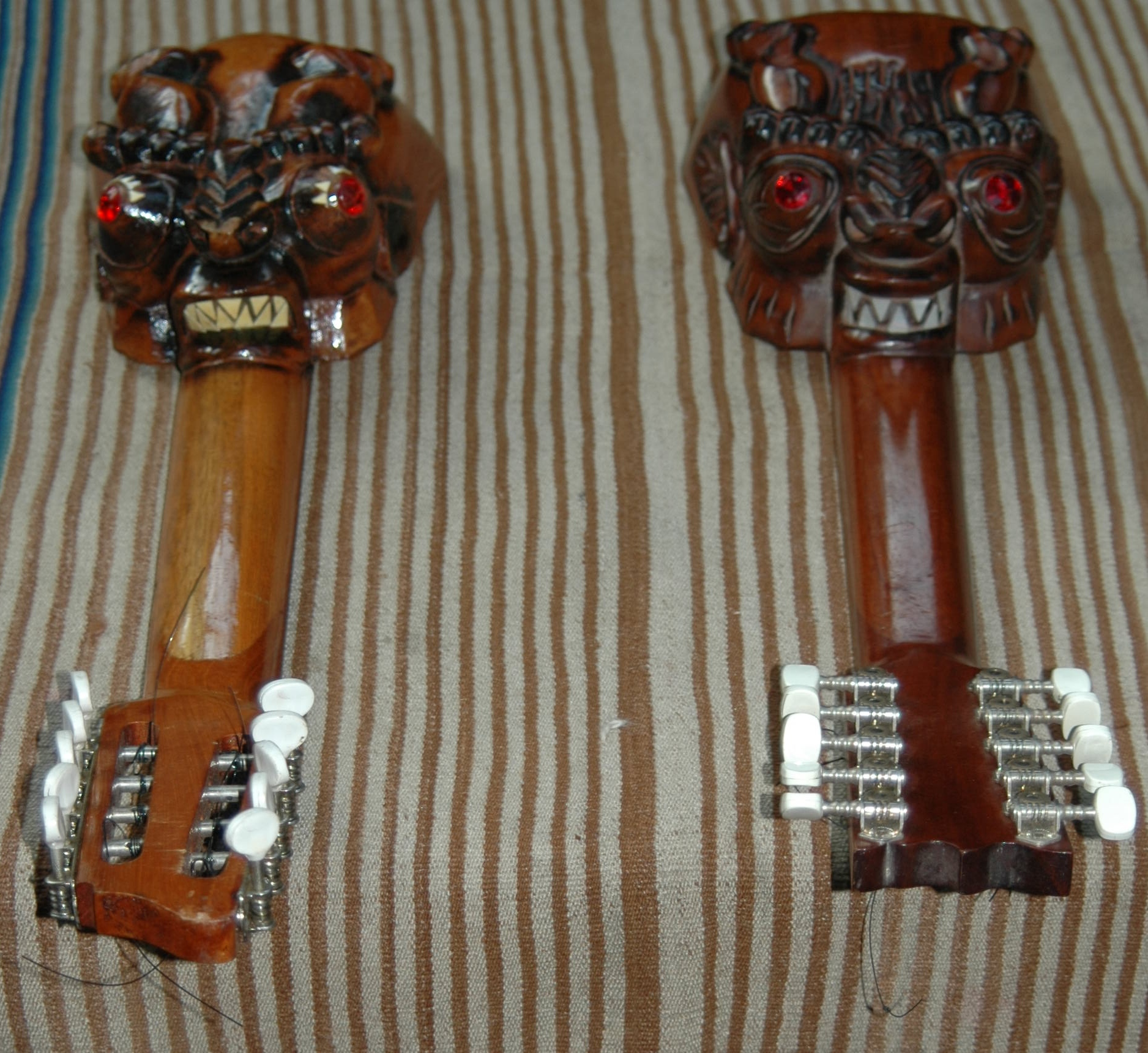 Charango aus der Sammlung Walter Kässbohrer, ausgestellt im Dietrich-Keuning-Haus Dortmund